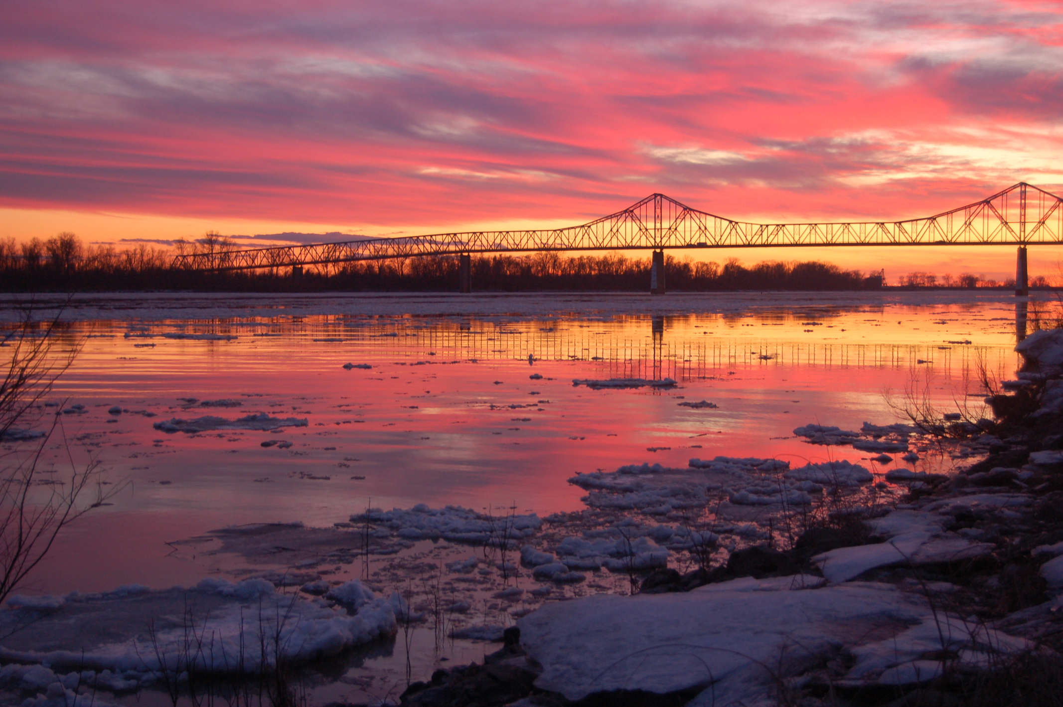 Mississippi/Ohio river confluence, Cairo, Illinois